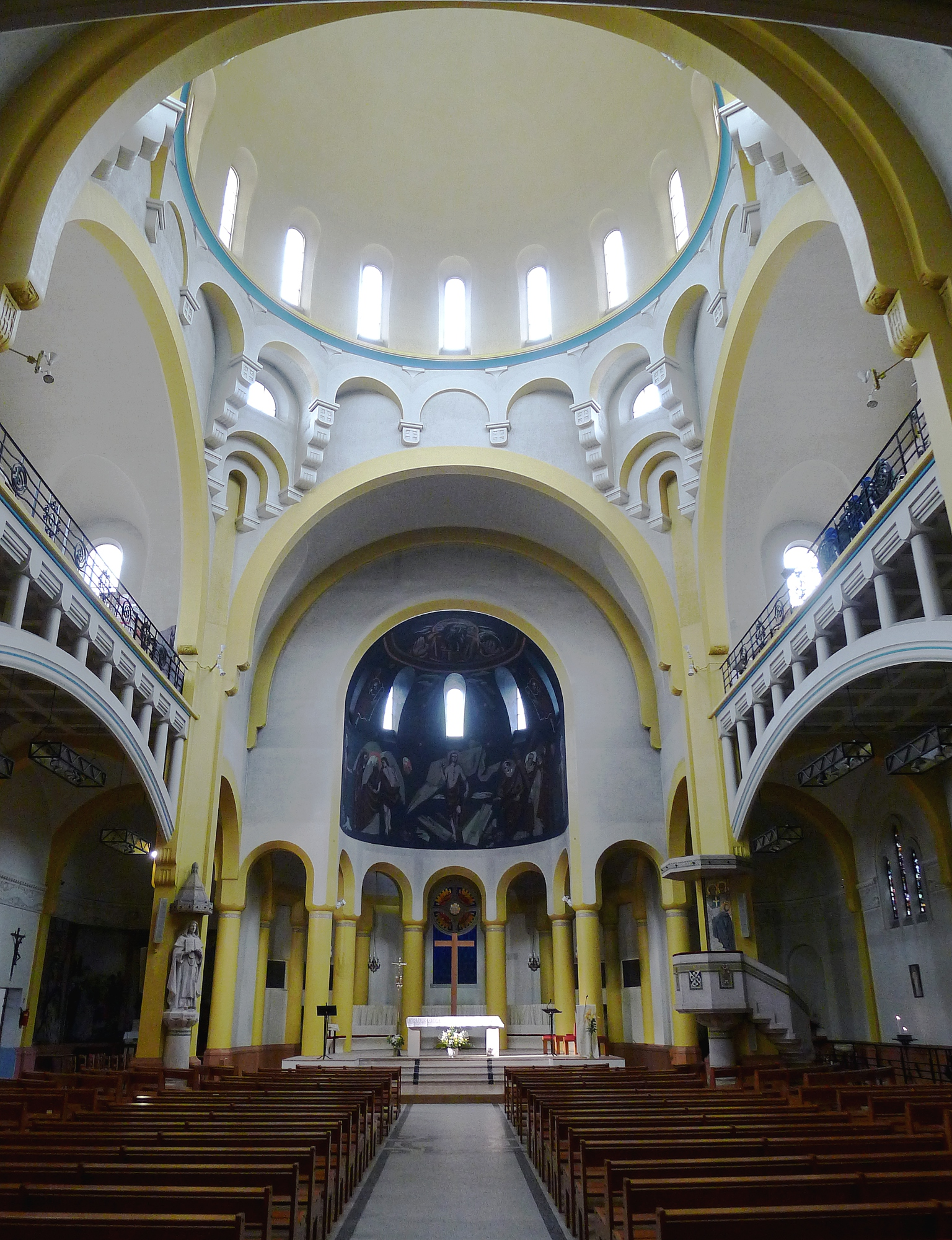 Église Saint-Dominique (nef) - Paris XIV